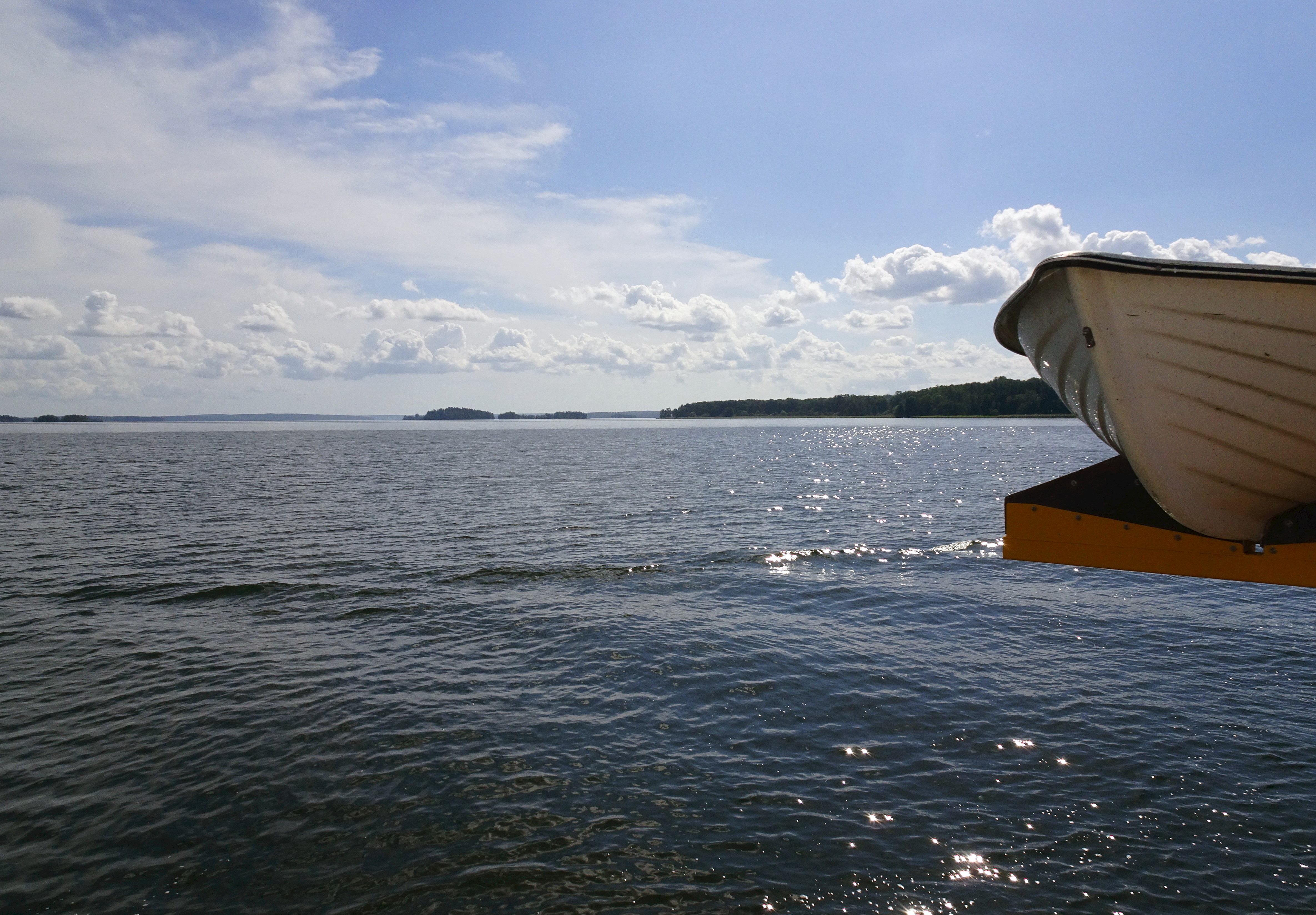 Svinsundet, Mälaren, vy mot söder från Färja 344 Tora